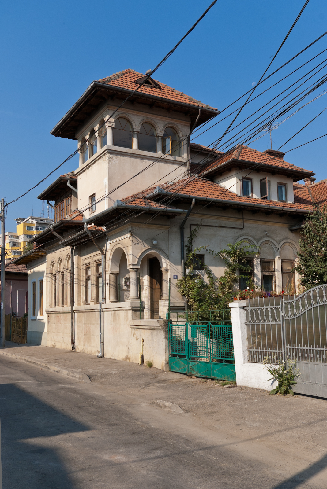 Fotografia prezinta casa de pe str. Gheorghe Lazar nr. 16, casa ce intra in componenta sitului urban "Str. Crinului".